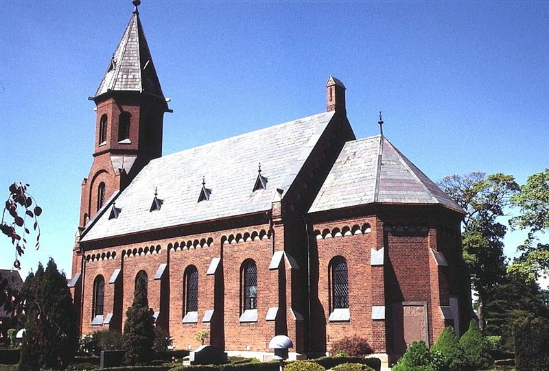 Galten Kirke set fra sydøst, Skanderborg Kommune, Østjylland Denmark